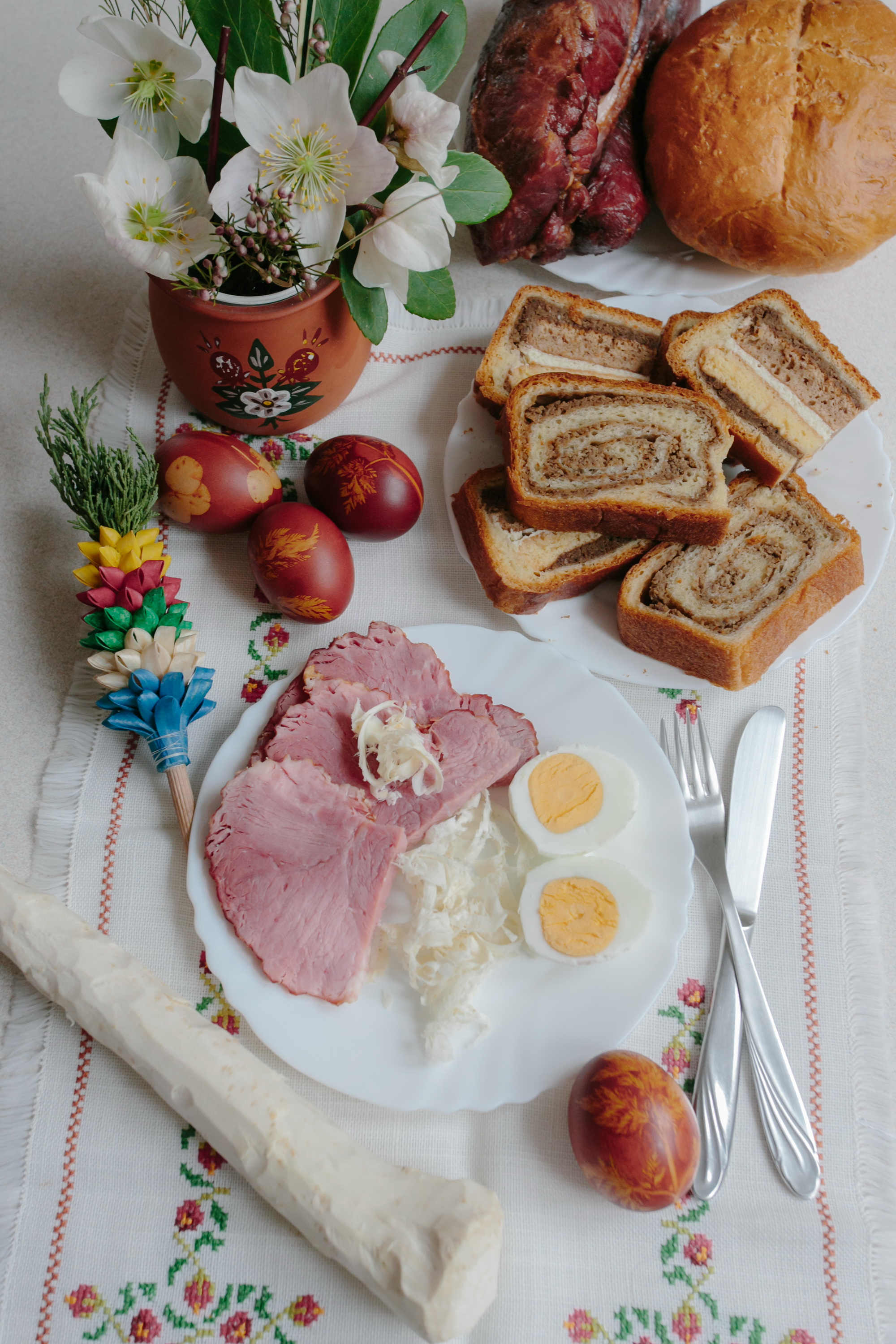 velikonočni zajtrk